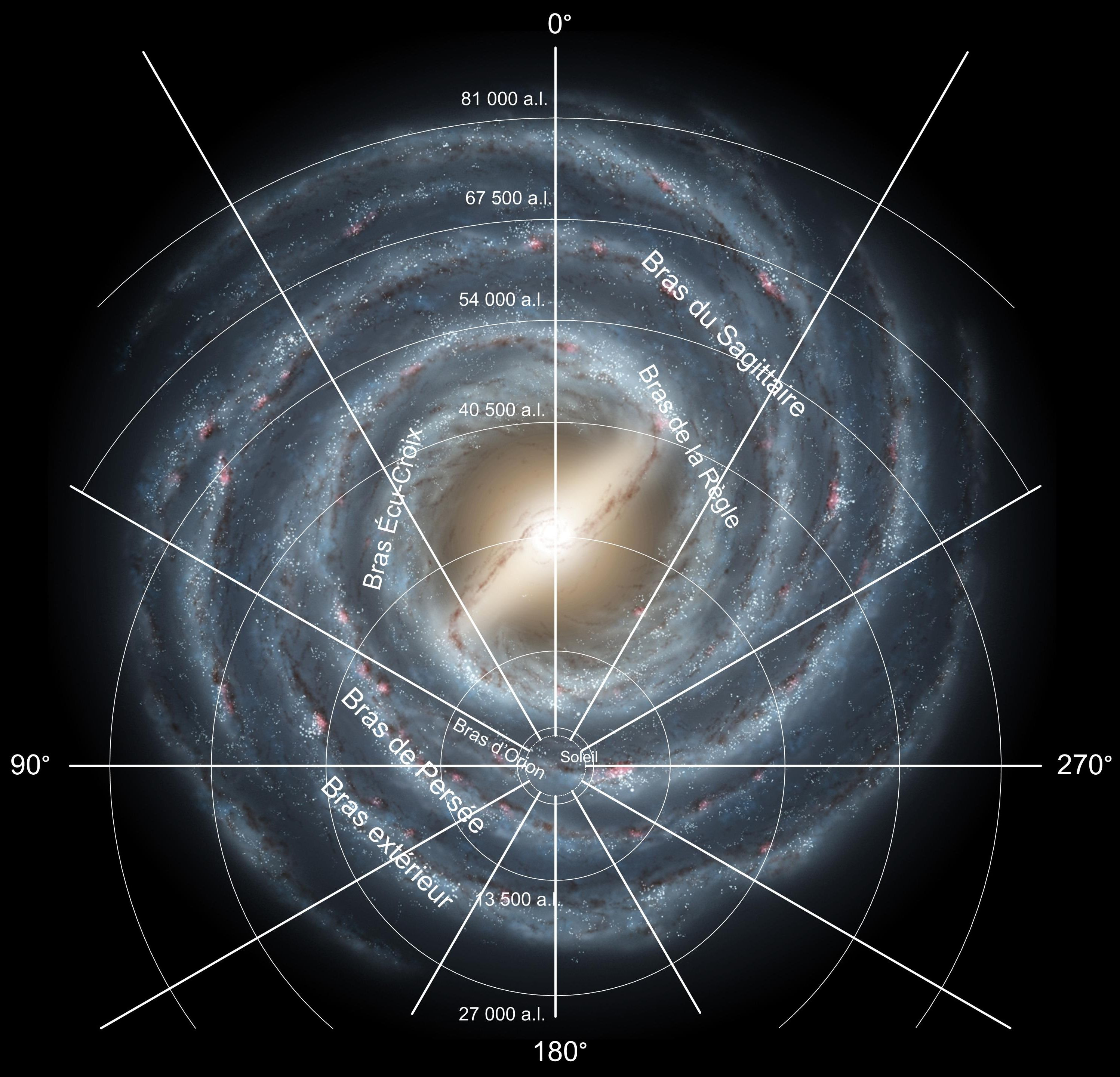 Voie lactée avec système de coordonnées galactiques superposé. Quelques bras sont identifiés.